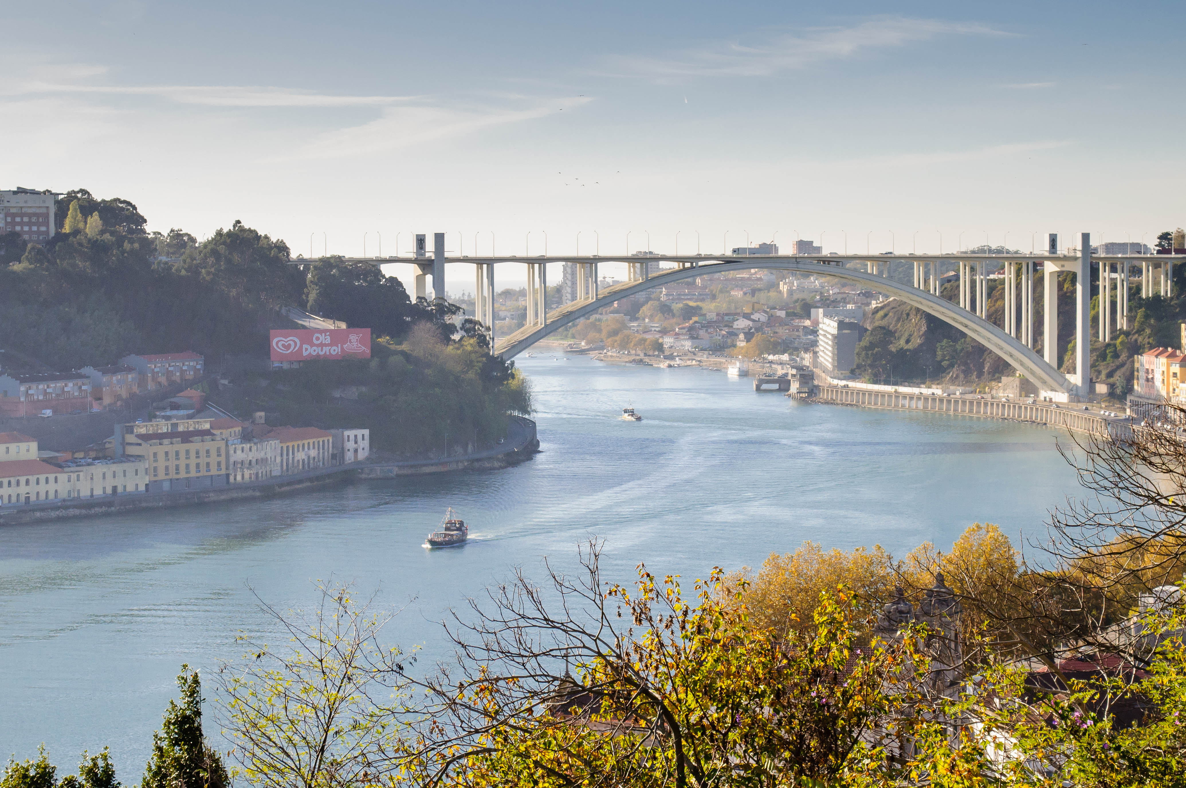 Le pont